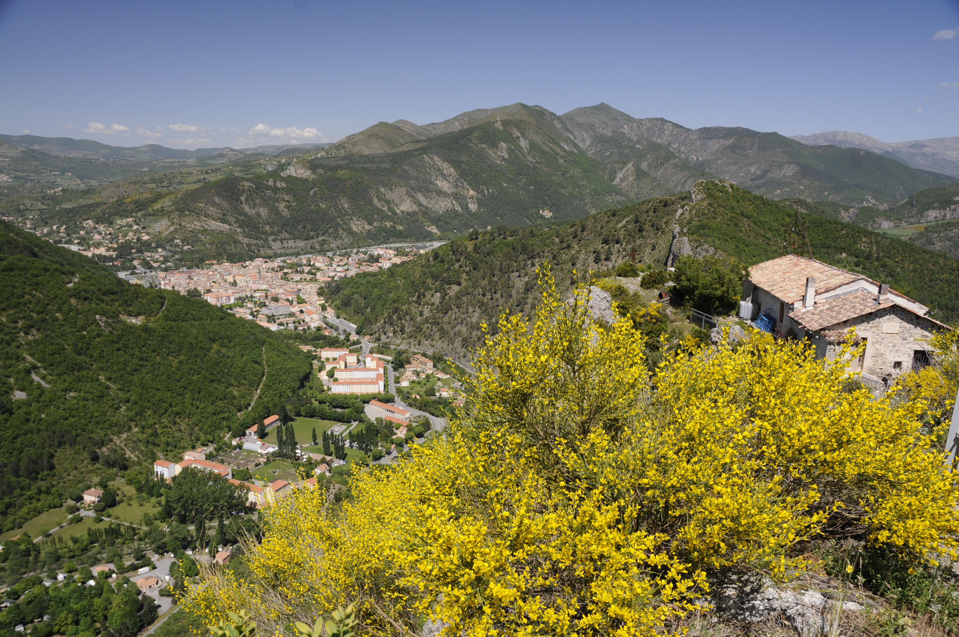 Vue générale de la ville de Digne-les-Bains préfecture des Alpes de Haute-Provence